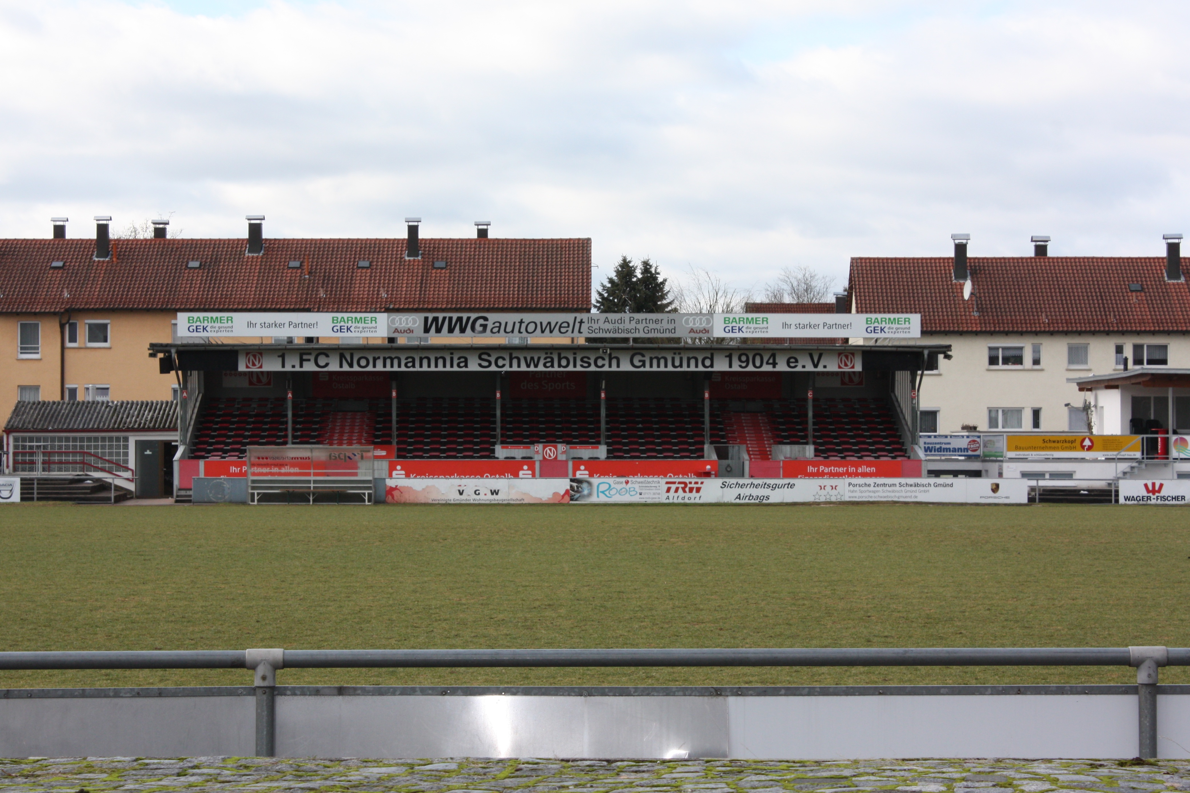 Tribüne im Jahn-Stadion (Normannia-Stadion) in Schwäbisch Gmünd, Heimat des 1. FC Normannia Gmünd